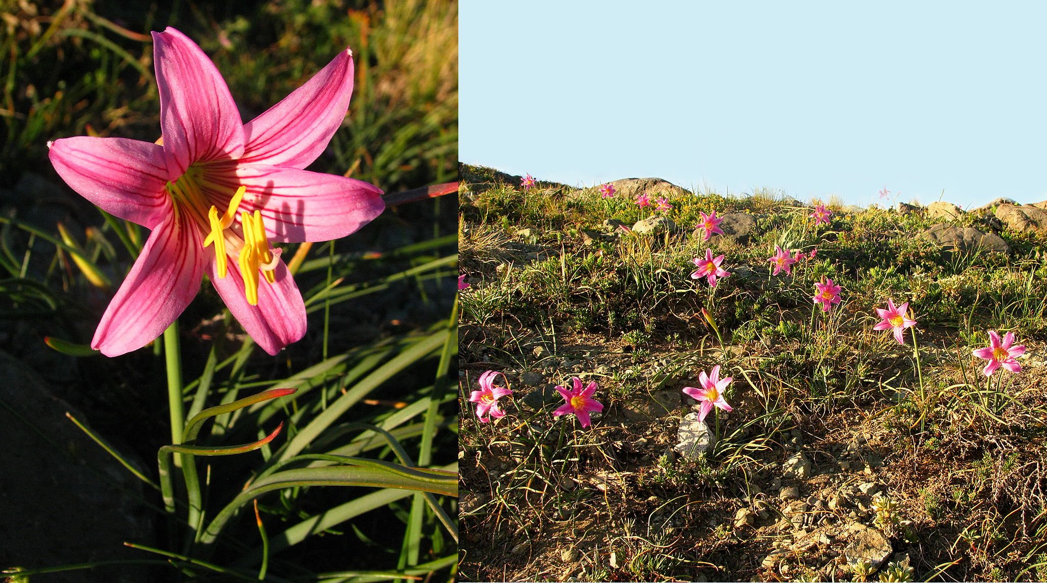 Añañuca de montaña en la Reserva Nacional Altos de Lircay, Chile.